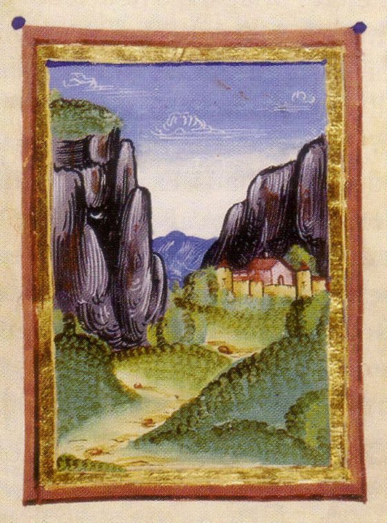 Landschaft mit dem Sinai und dem Katharinenkloster. Miniatur auf Pergament (Nürnberg um 1508/08), eingeklebt in der Abschrift von Felix Fabri: Evagatorium von der Hand Hartmann Schedels, Bayerische Staatsbibliothek Clm 189, Bl. 55r Source: 50 Jahre Sammler und Mäzen, Schweinfurt 2001, S. 253